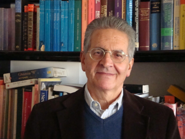 Immagine di Filippo Frontera